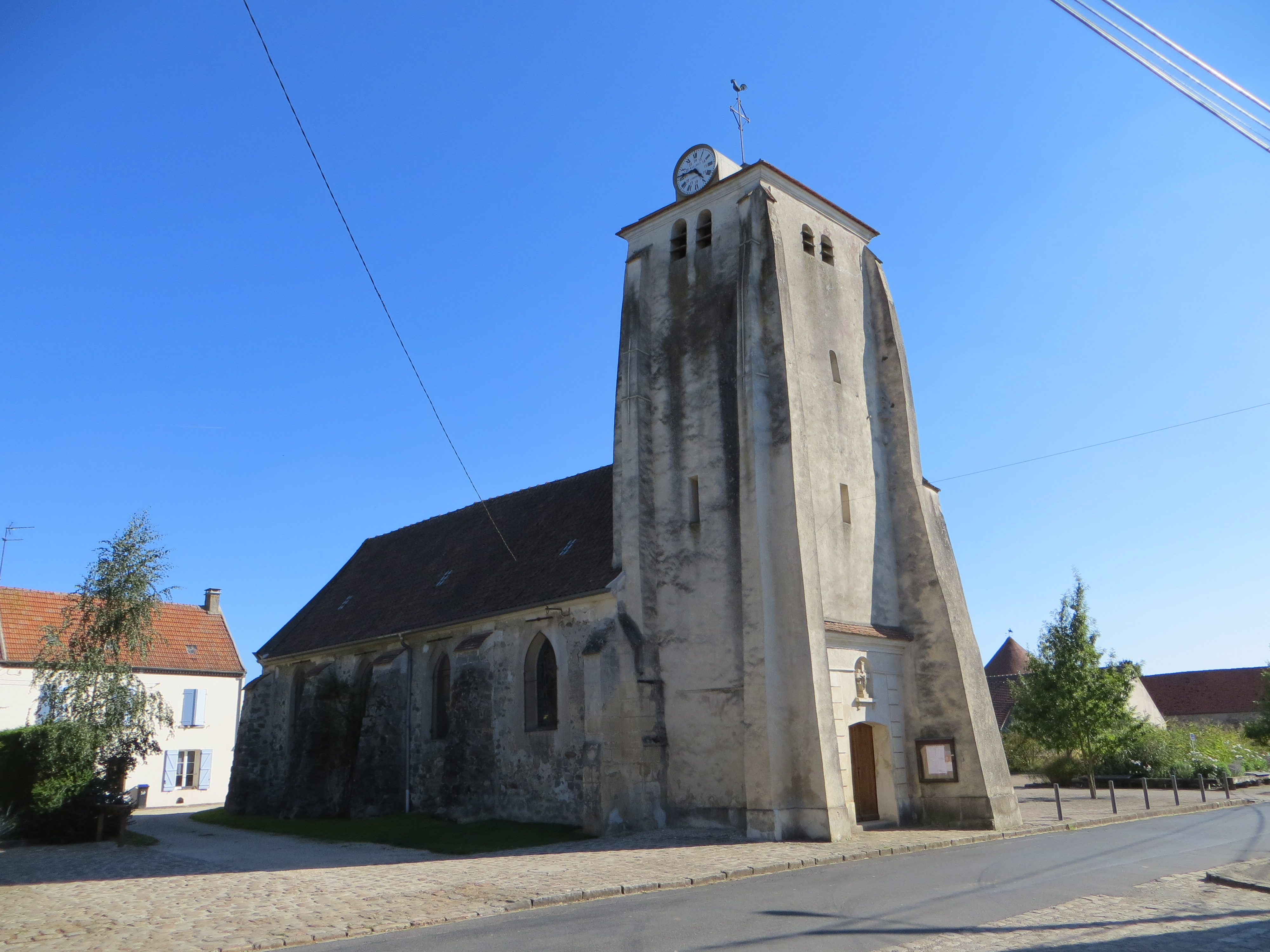 Vue générale de l'église